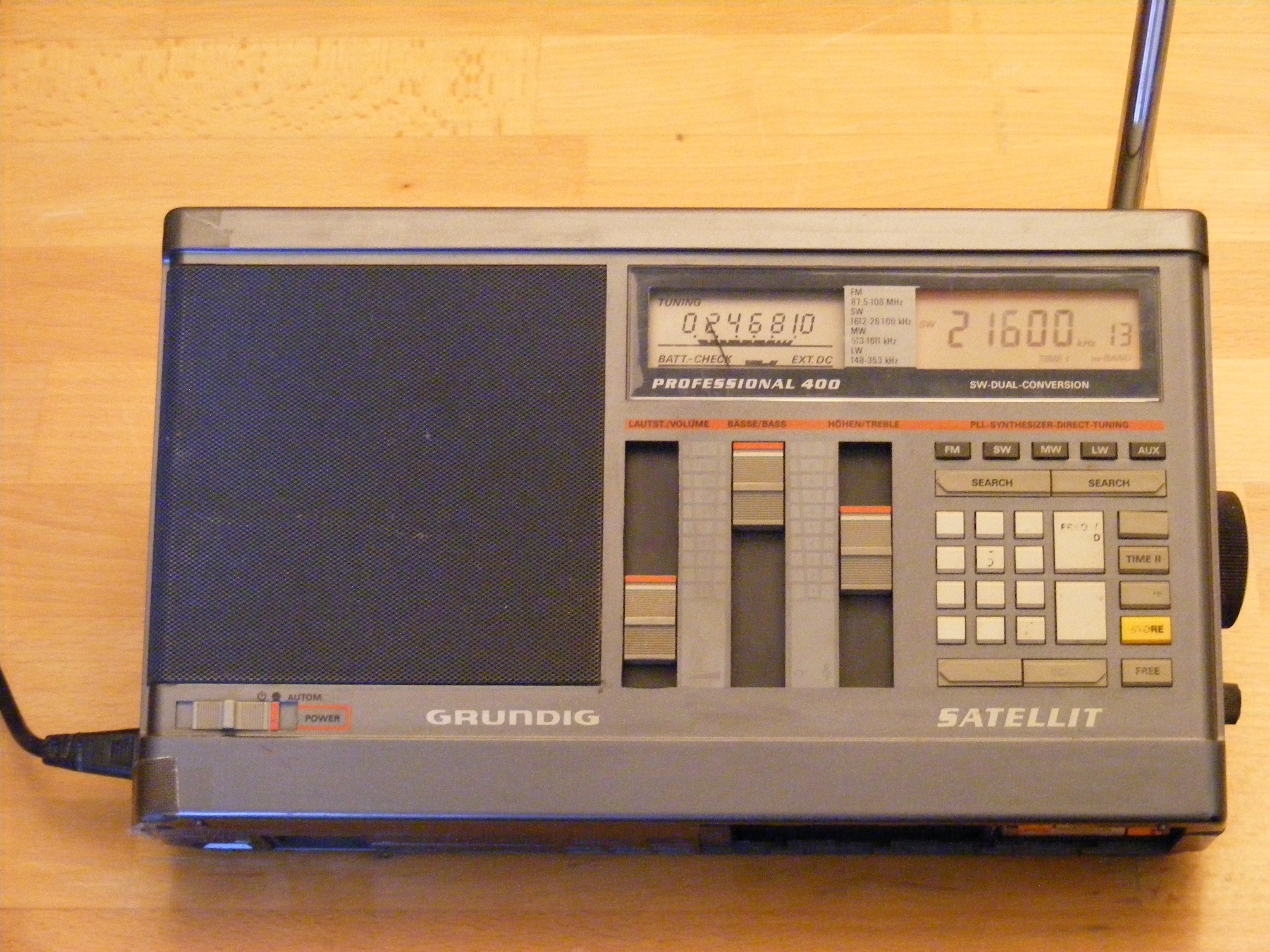 Grundig Satellit Professional 400, Weltempfänger (Bj. ca. 1985)